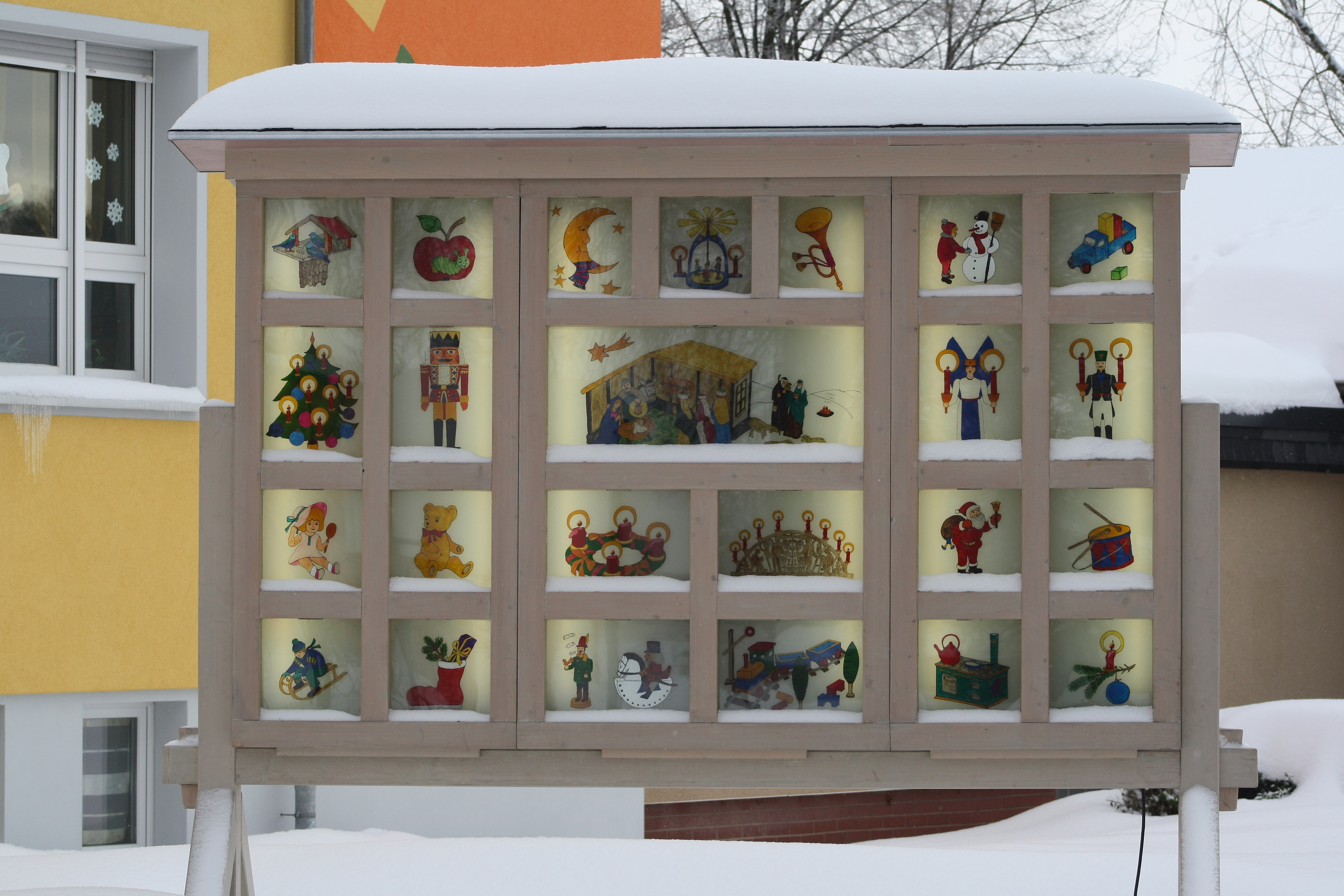 Weihnachtskalender. Hohndorf. Erzgebirgskreis.